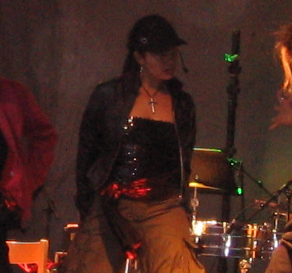 Foto:Philippe